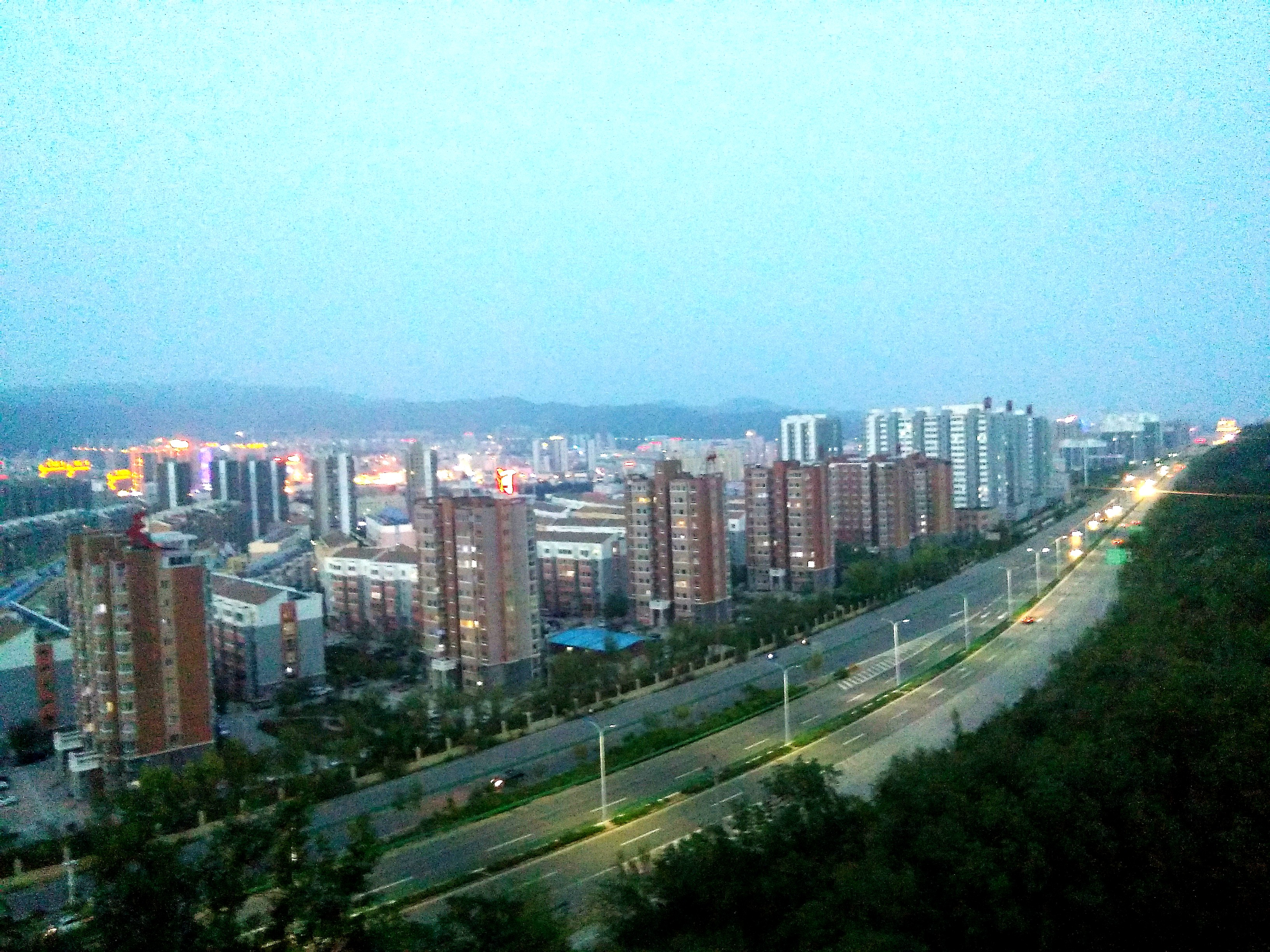 张家口市西环路，拍摄自西北方向，赐儿山附近